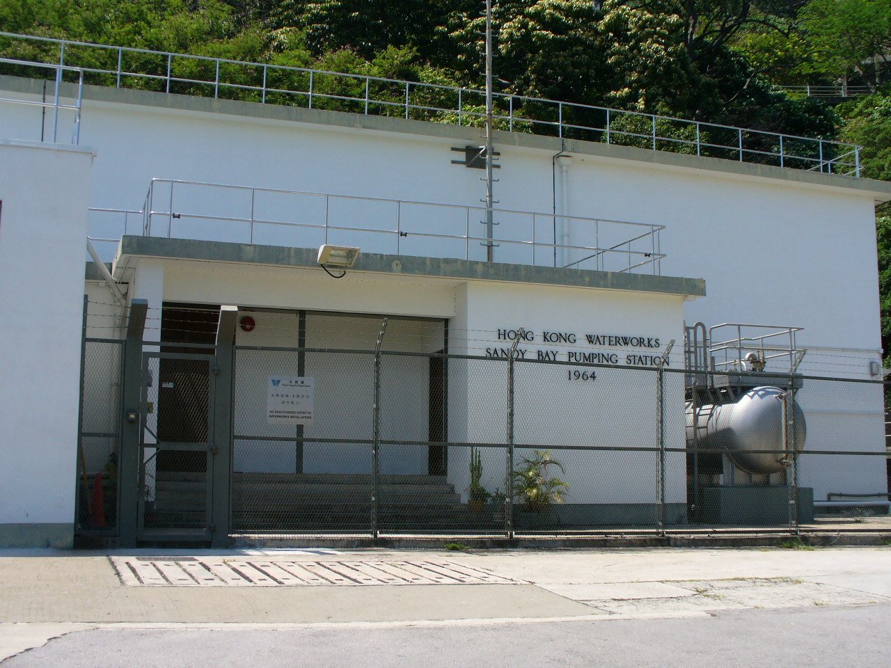 中文（香港）: 大口環抽水站